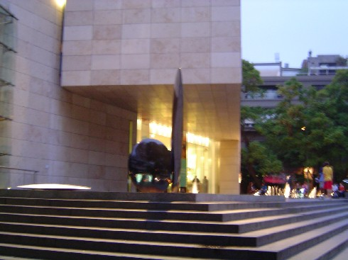 Fachada del Museo de Arte Latinoamericano de Buenos Aires (MALBA) en el barrio Palermo de Buenos Aires.